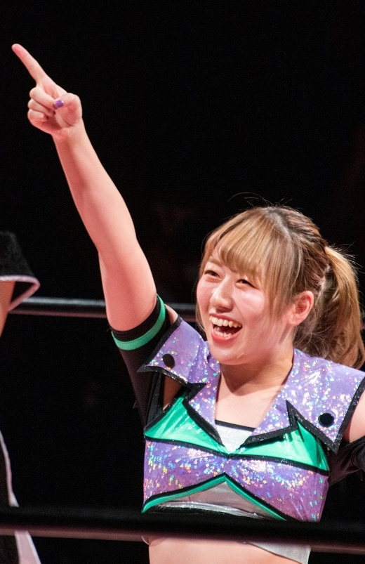 プロレスラーの汐凛セナ